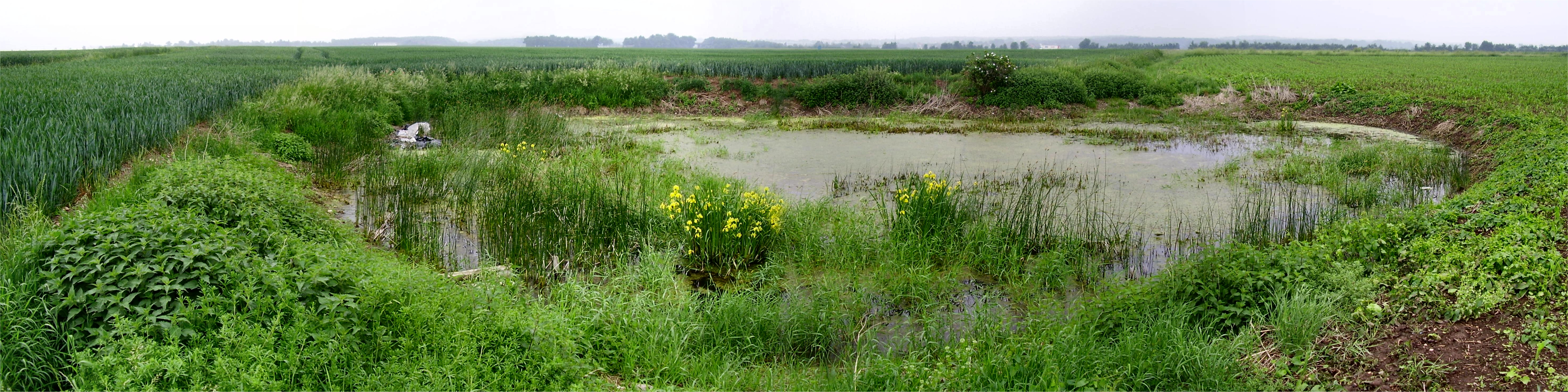 Laichgewässer der Knoblauchkröte in der Börde bei Heimerzheim, Rhein-Sieg-Kreis, NRW, 2008